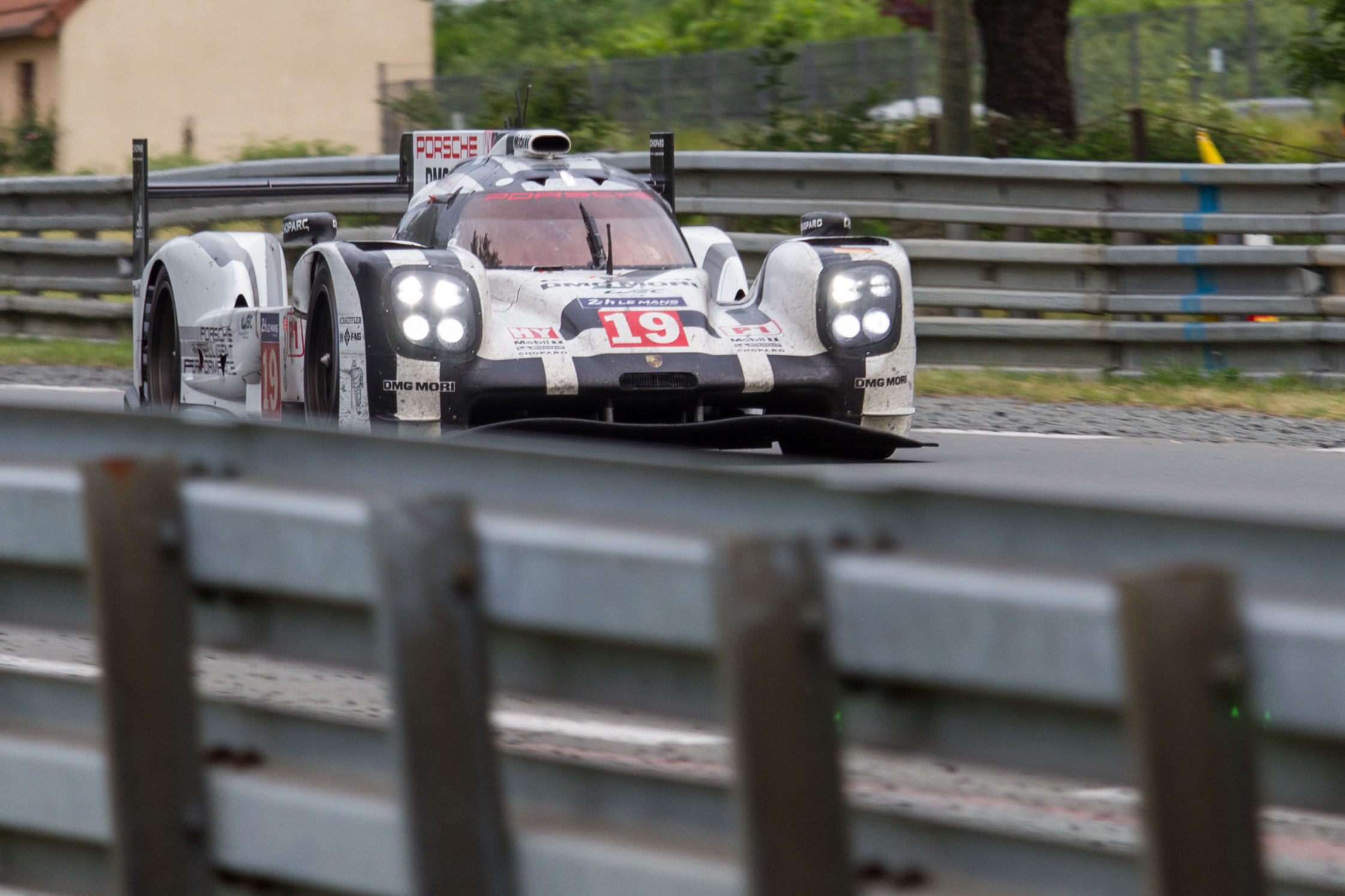 La Porsche n° 19, première aux 24 h du mans ( avec comme pilotes l'allemand Nico Hülkenberg, , le Néo -Zélandais Earl Bamber et le Britannique Nick Tandy)